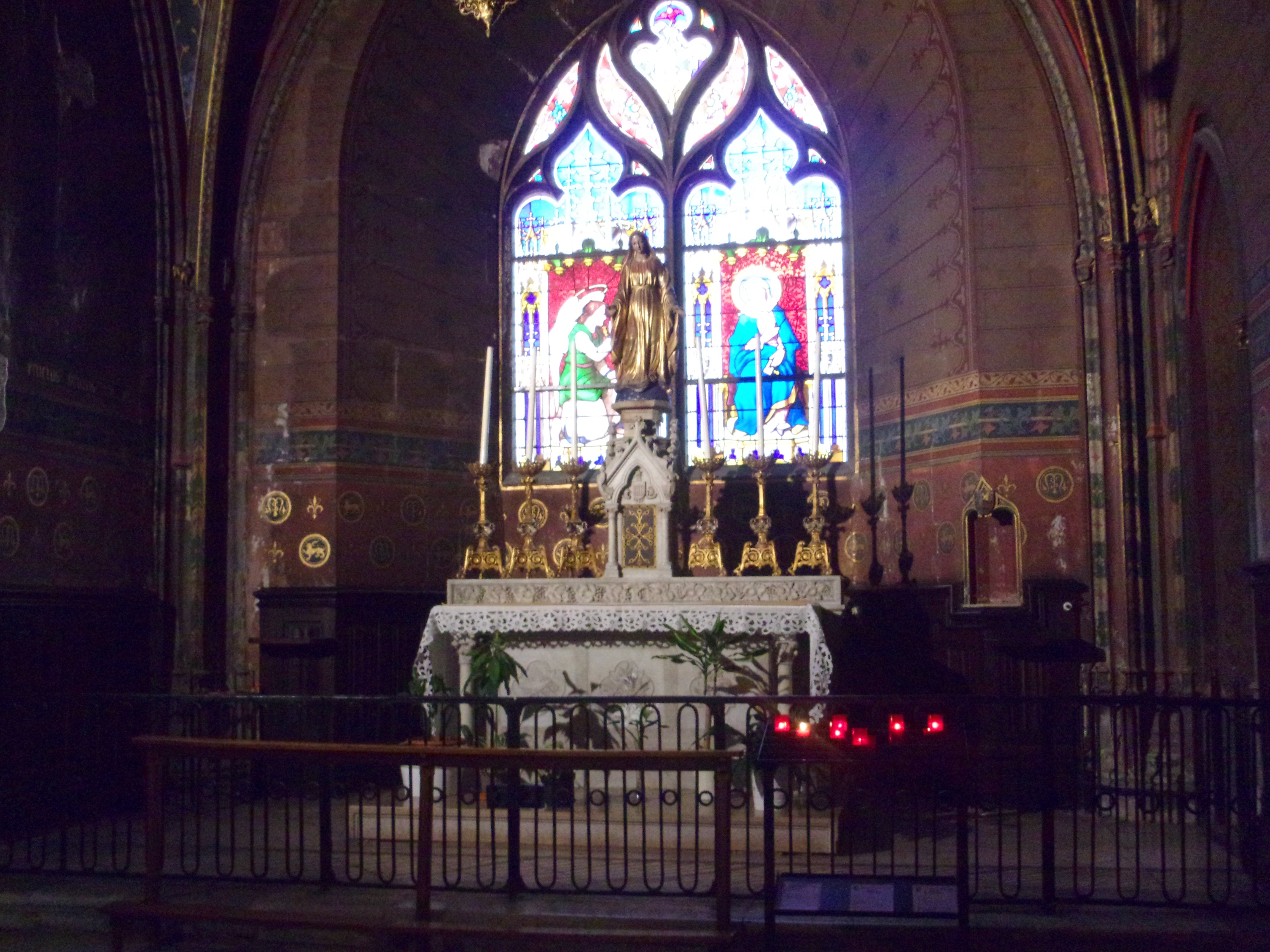 Chapelle de la Vierge à gauche dans la cathédrale Notre-Dame de Grenoble.